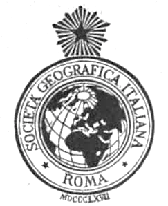 Logo of Società Geografica Italiana in Rome